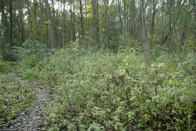 Střemchová jasenina v PP Obroa v Uhříněvsi